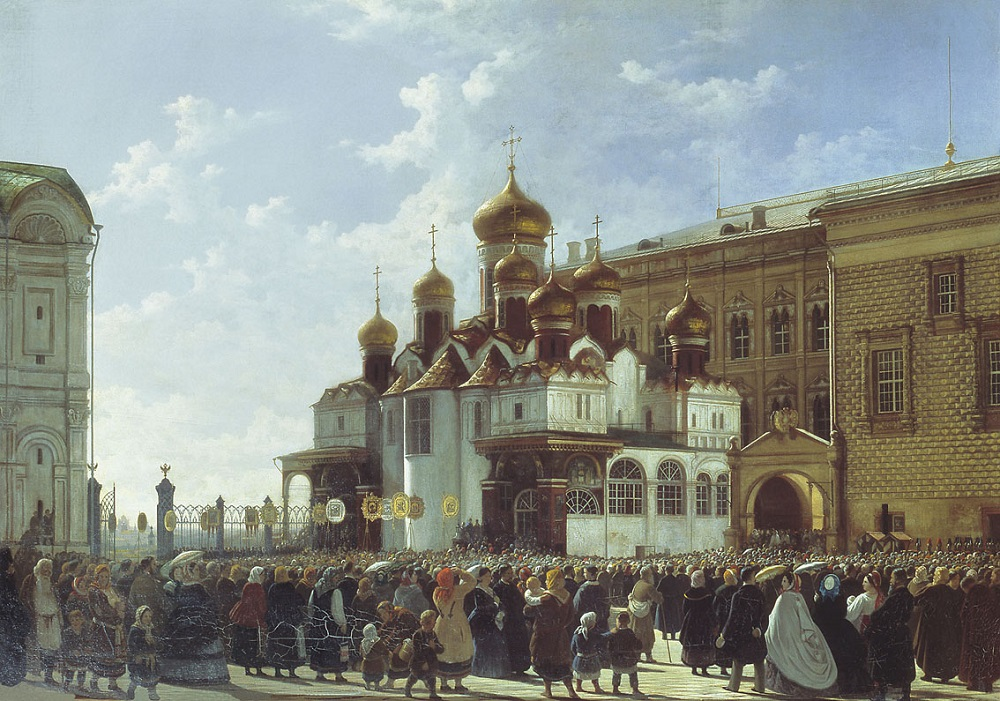 Картина "Крестный ход у Благовещенского собора в Московском Кремле" - художник Бодри Карл (Карл-Фридрих) Петрович (1812-1894) — русский живописец, портретист, мастер городского пейзажа и бытового жанра, академик Императорской Академии художеств.